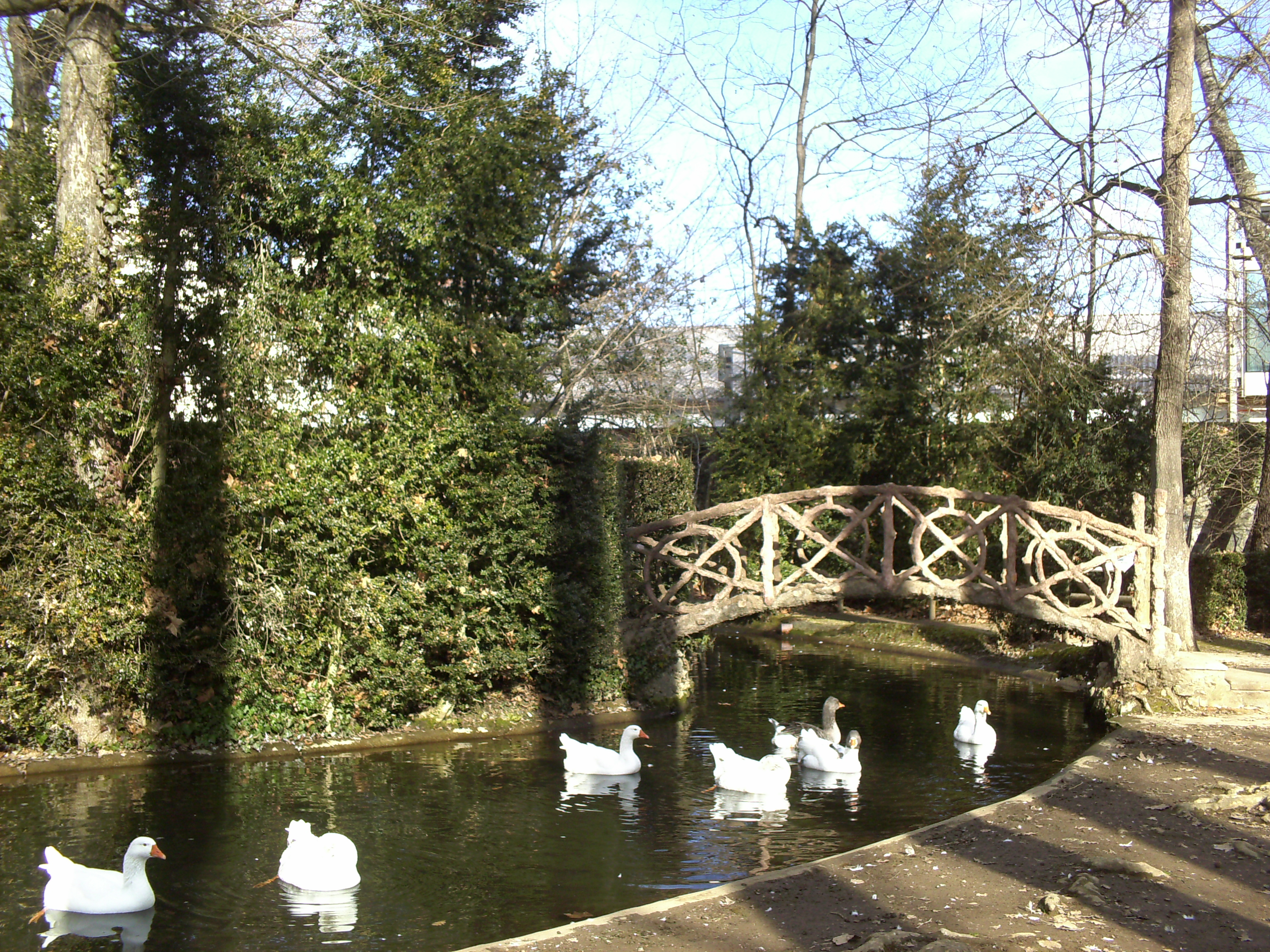 Petit estany amb oques nedant al Parc Nou d'Olot